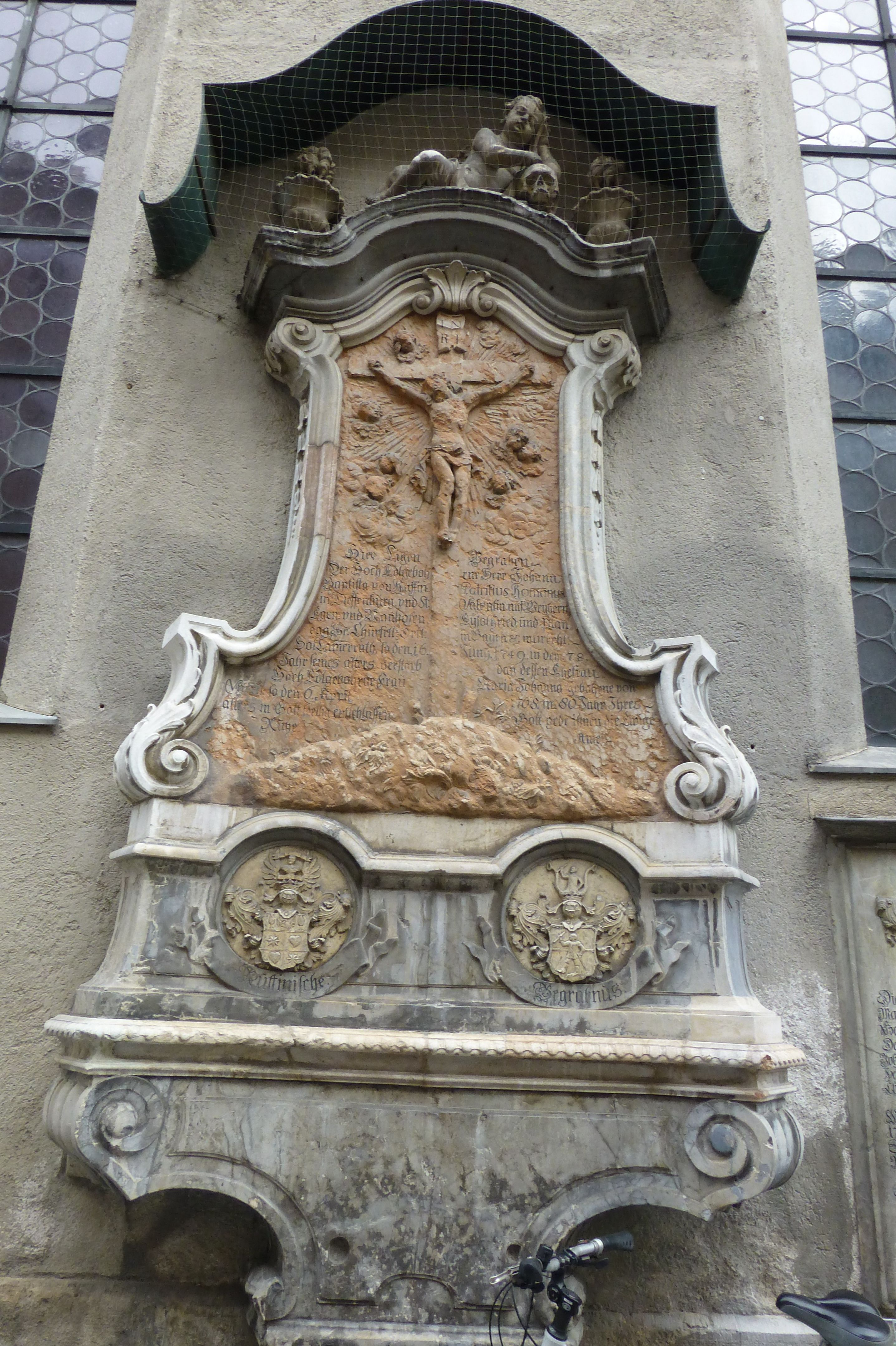 Epitaph von Johann Baptist von Ruffin (gest. 1749) und seiner Frau Johanna von Unertl (gest. 1768) an der Außenmauer von St. Peter in München